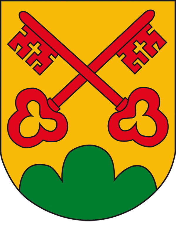 Wappen der Marktgemeinde St. Peter am Wimberg